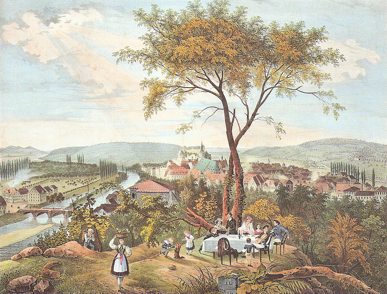 Tübingen vom Österberg (Kreidelithographie 37 × 48 cm); Schefold 9335